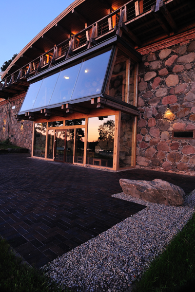 Rekonstruoto Vasaknų dvaro svirno vaizdas nuo ežero pusės